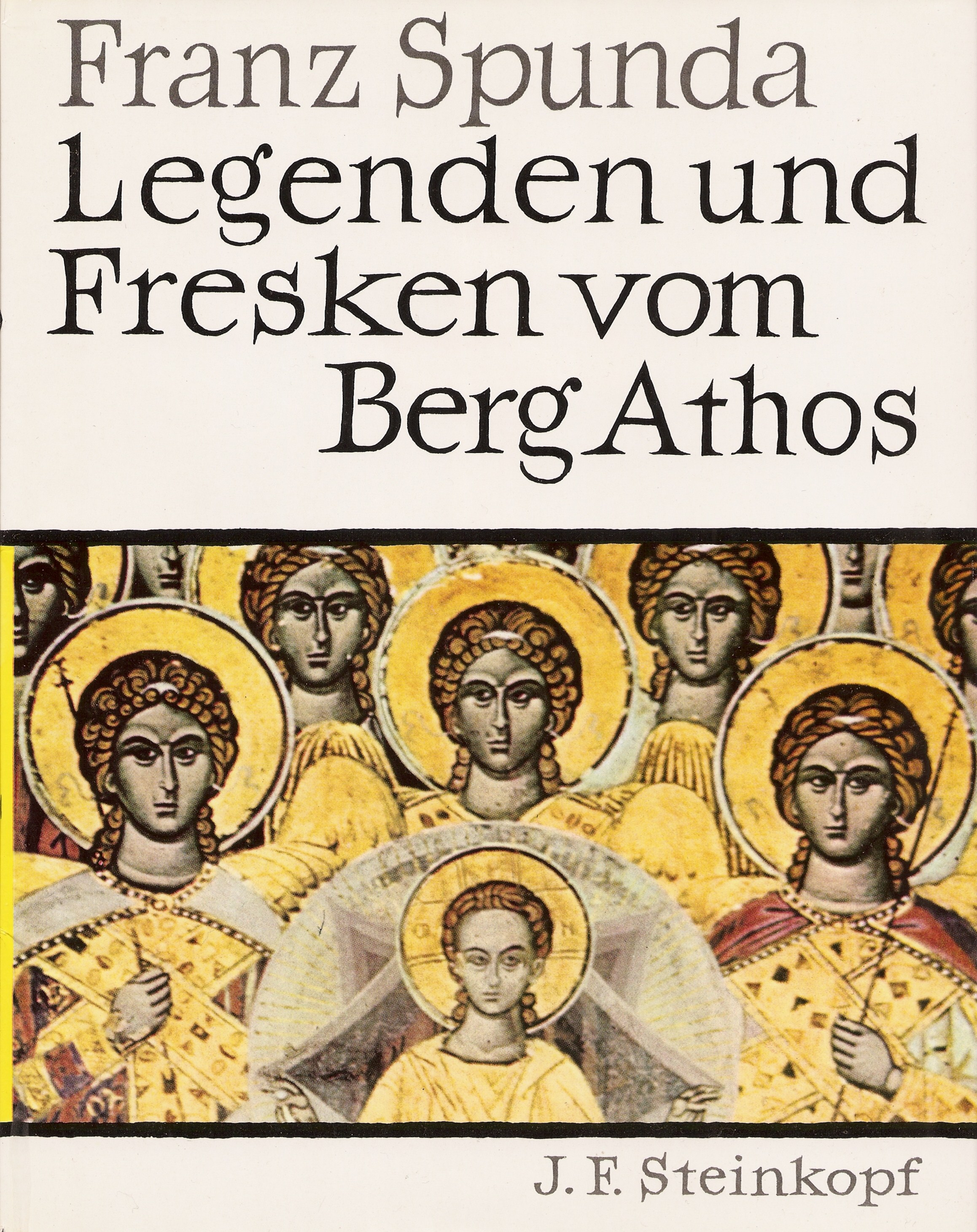 Franz Spunda: Legenden und Fresken vom Berg Athos. Stuttgart 1962; vordere Umschlagseite.